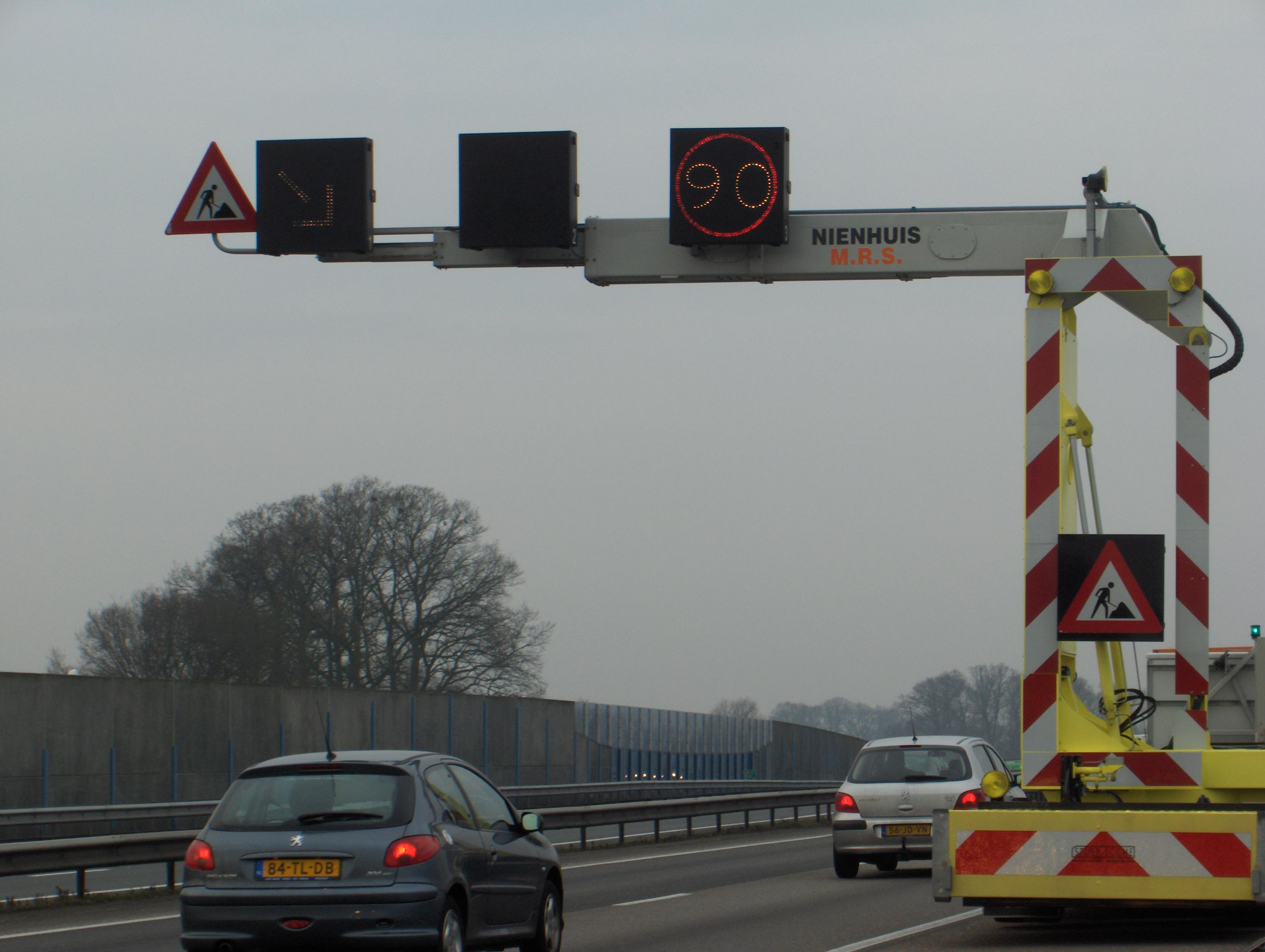 Mobiele Dynamische Route Informatie Paneel. Foto gemaakt op 21 Februari, A28 bij Wezep. Spoedreperatie aan de vangrail in de middenberm thv HMP 79.4 Eigen werk, GFDL/cc-by-sa multilicentie